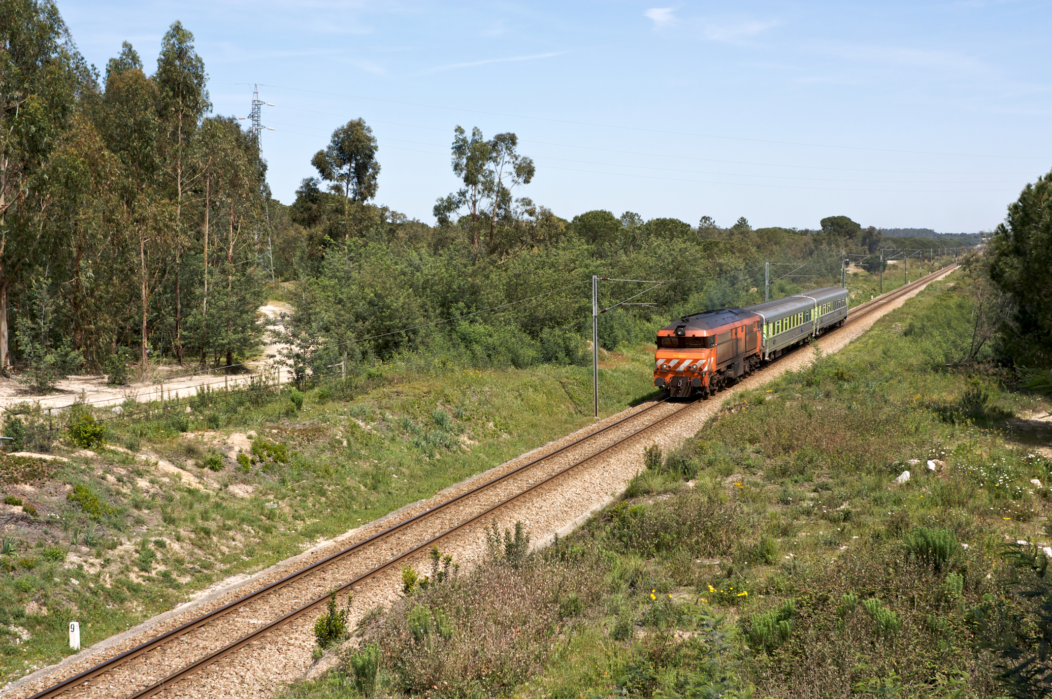 Tipo: Comboio Intercidades 692 [Évora - Lisboa • Oriente] Local: Bombel [Linha do Alentejo, PK 48] Data e hora: 9 de Abril de 2010 [14h28] Material: Locomotiva 1944 + 2 carruagens Sorefame Renovadas